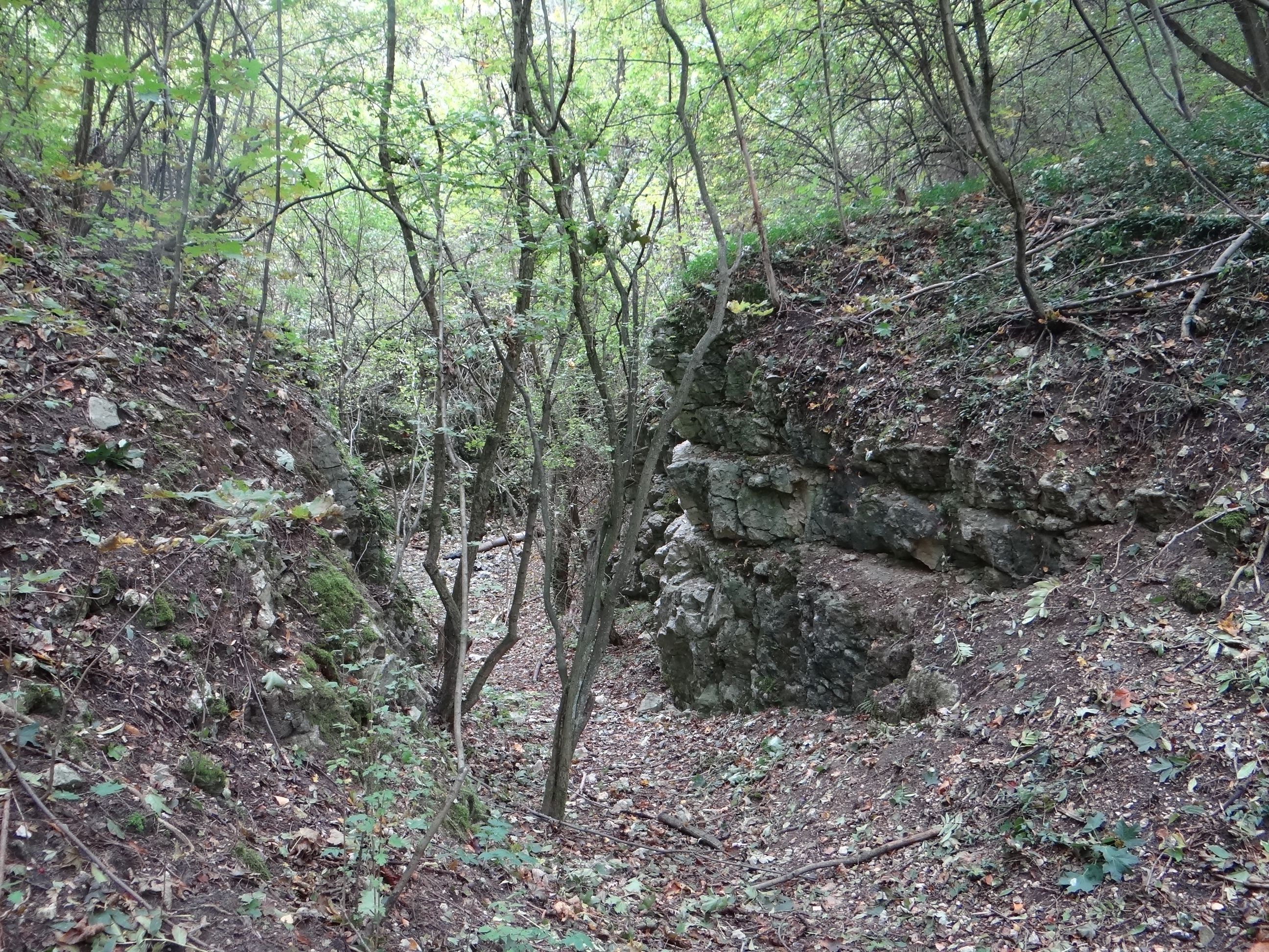 Kanion w Pychowicach pomiędzy Kawerną II i III